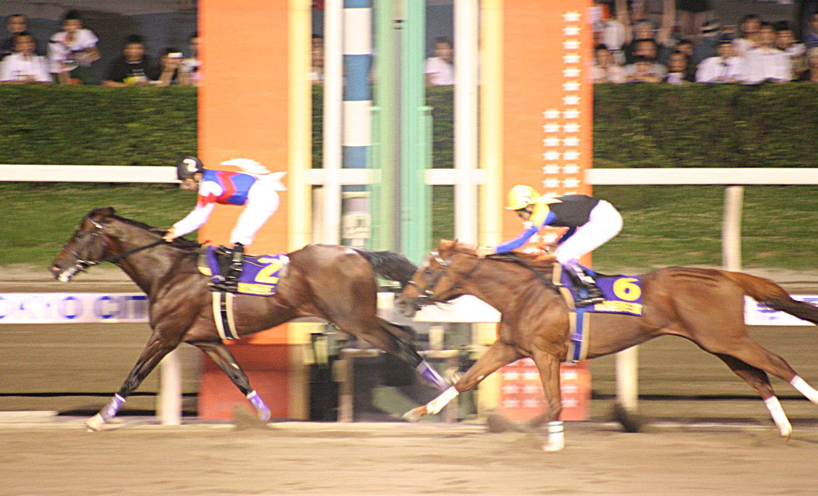 帝王賞（大井競馬場） 左アジュディミツオー、右カネヒキリ